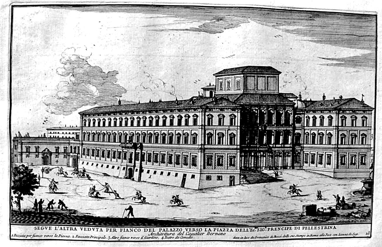 Palazzo Barberini, Rome